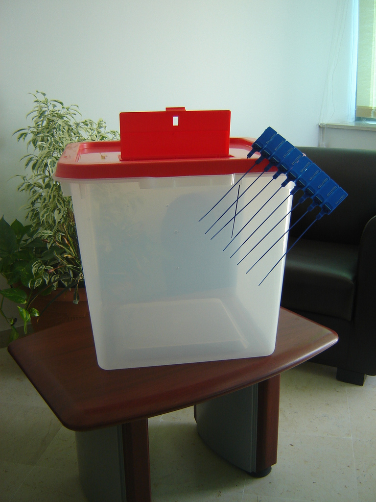 Urne officielle acquise par l'Instance supérieure et indépendante des élections tunisienne pour le scrutin du 23 octobre 2011